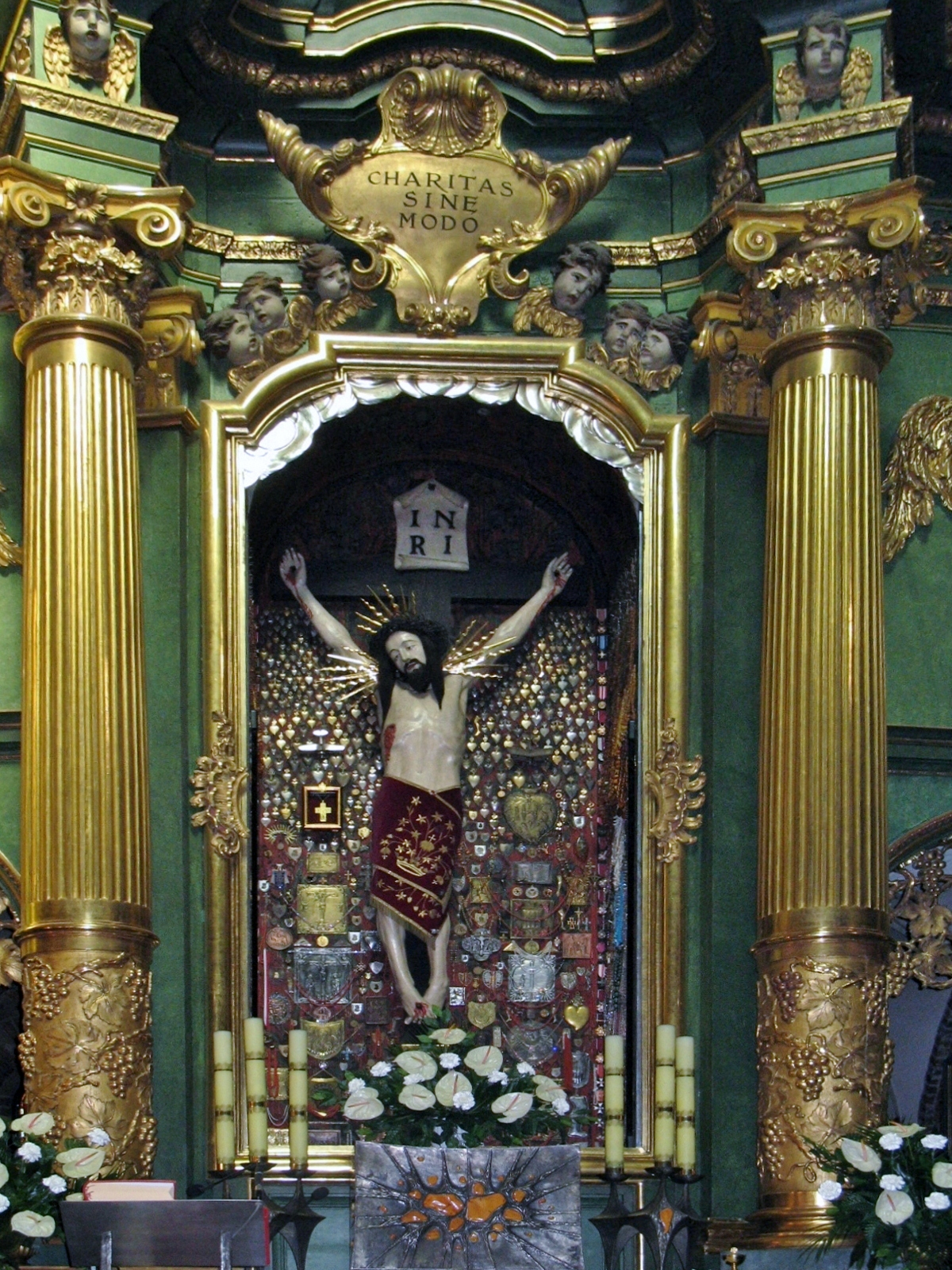 Figura cudownego Pana Jezusa, Opactwo Cystersów w Mogile, Kraków The Holy Cross, the Cistercian Abbey in Mogiła, Kraków